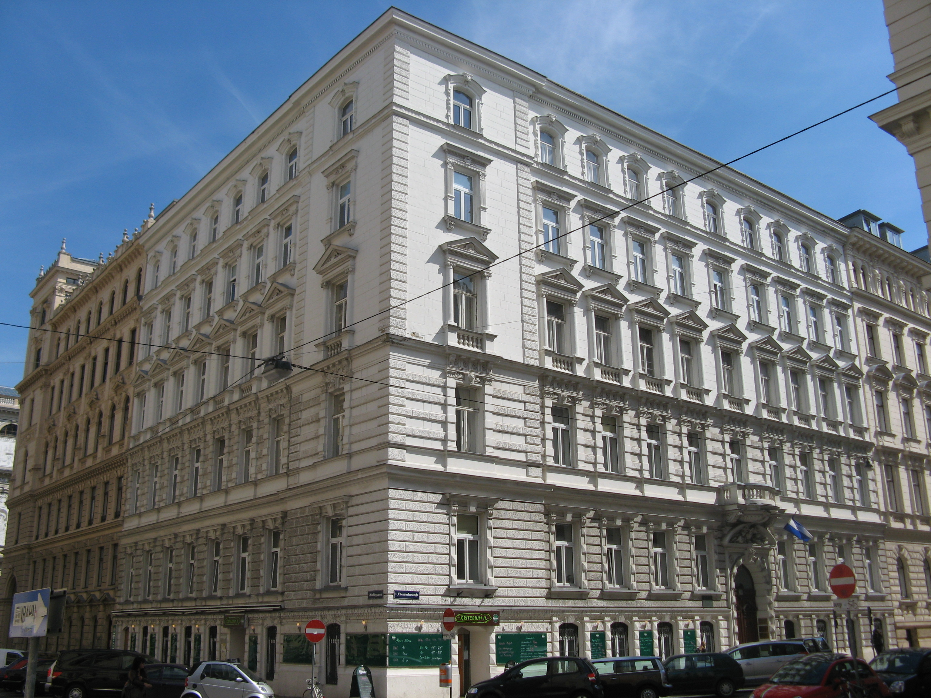 Haus (1883-84) von Wilhelm Stiassny, Ebendorferstraße 10, Wien-Innere Stadt